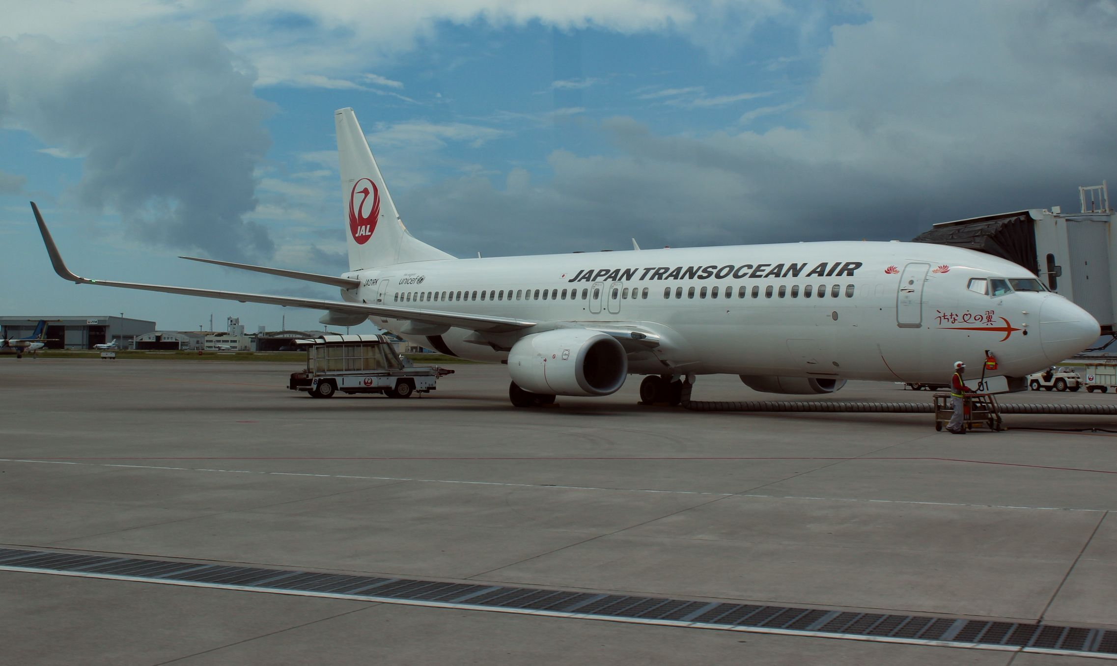 日本トランスオーシャン航空 Boeing 737-800 JA01RK